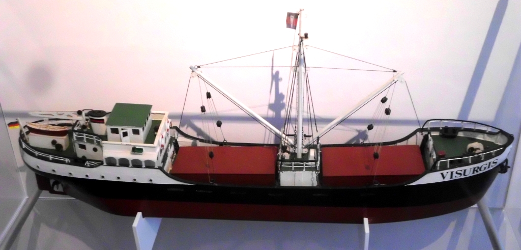 Modell vom Frachter Visurgis im Museum Brake, Haus Elsfleth